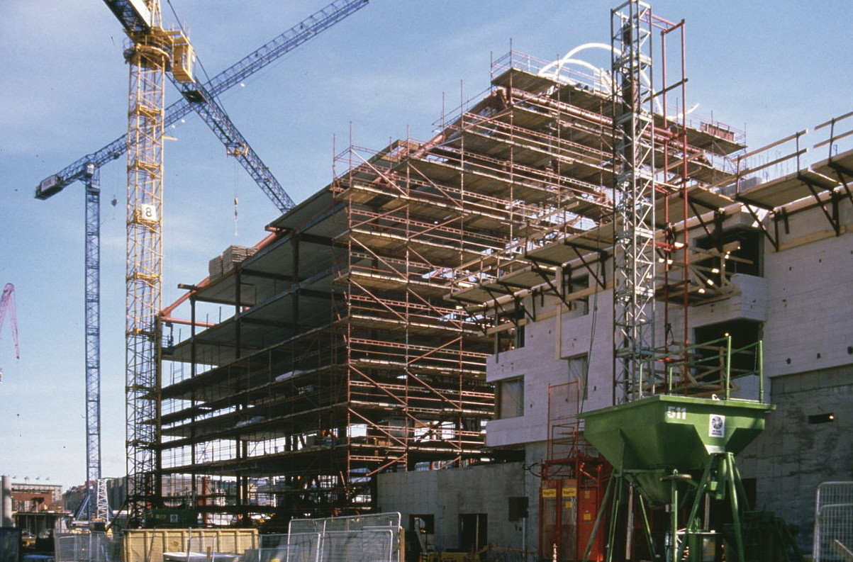 Bygget av stationshuset för Södra station